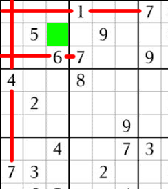 Ejemplo de trazado en Sudoku. En la casilla verde debe figurar un 7, en virtud de las casillas eliminadas por el trazado a partir de otros sietes.